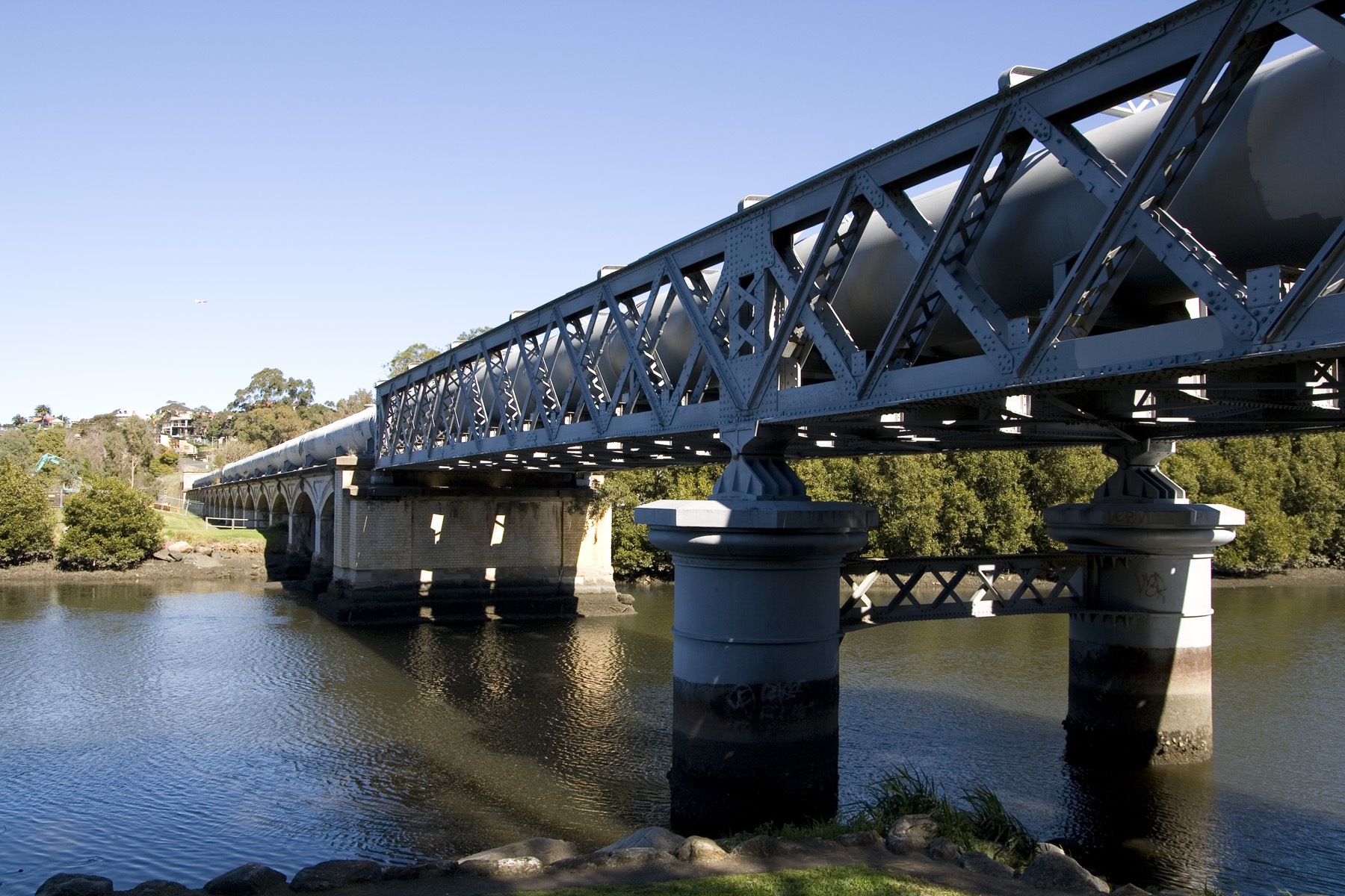 Cook river